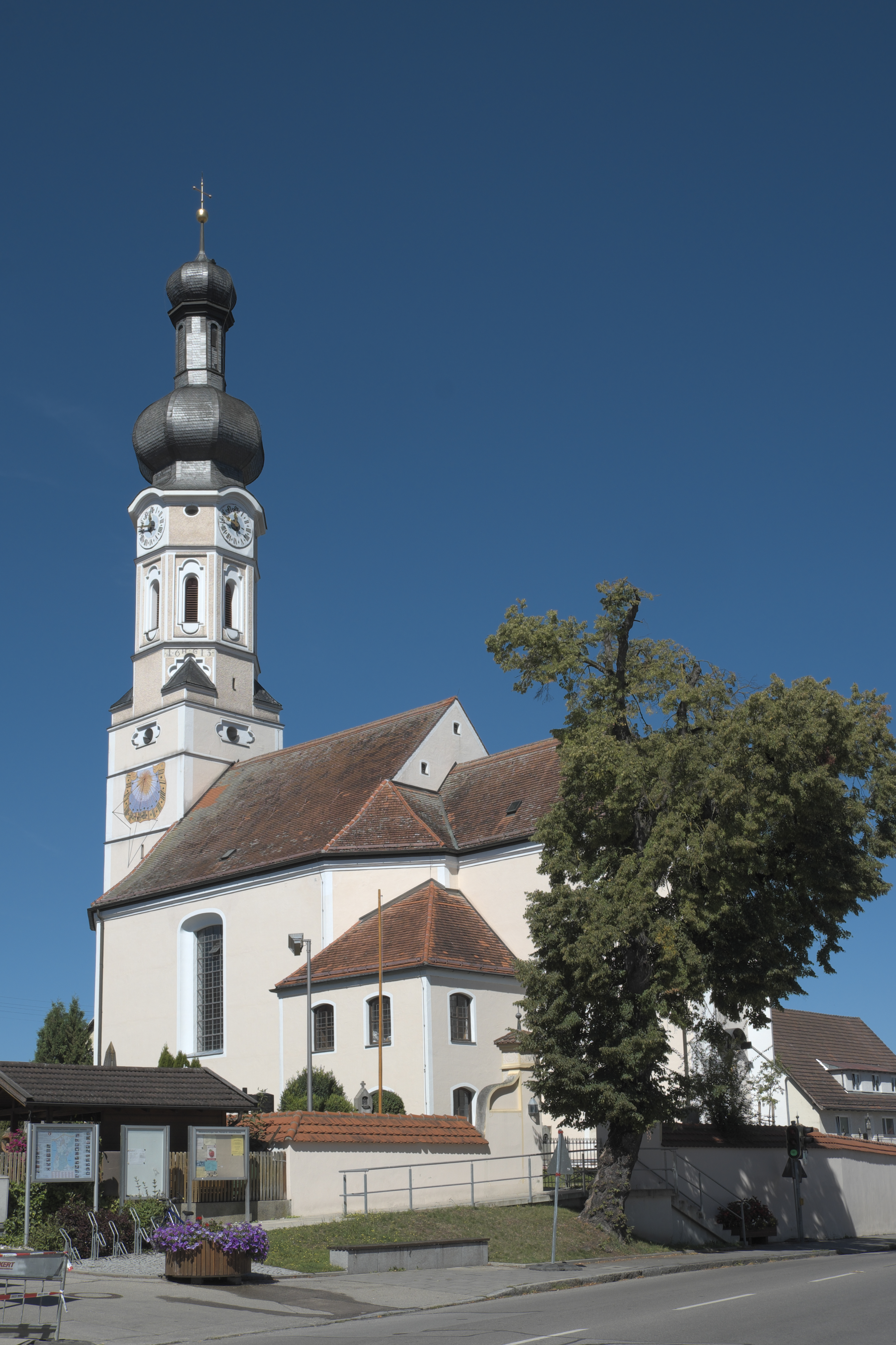 Katholische Pfarrkirche St. Johannes Baptist in Inning am Ammersee im Landkreis Starnberg (Bayern/Deutschland)